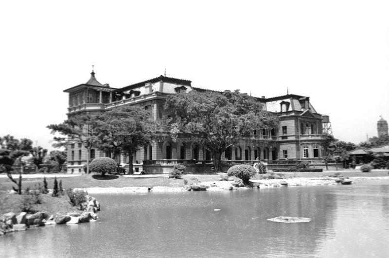 1961年的台北賓館